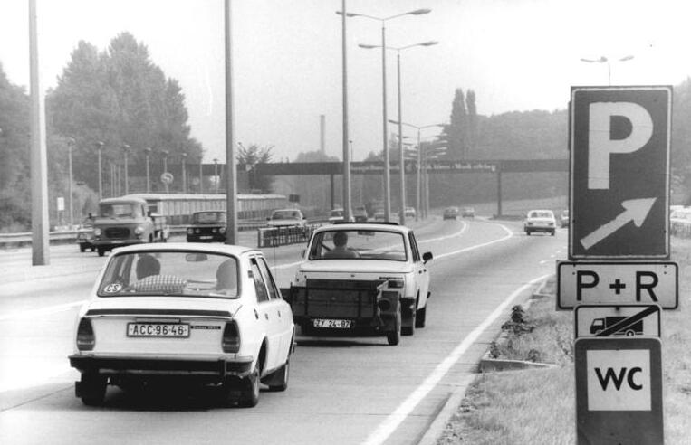 ADN-ZB-Oberst-10.8.88-mx-Berlin: Parken + Reisen- Berlinbesucher, die über die Autobahnabfahrt bei Schönefeld in die Stadt hineinfahren, kommen an diesem Zeichen vorbei. Doch beachtet wird es von zu wenigen. Der P+R-Parkplatz in Altglienicke bleibt oftmals leer. Lieber nehmen Autofahrer Staus, langes Parkplatzsuchen und damit Zeitverlust in Kauf. Doch muß das sein? In nur 25 Minuten gelangt man mit der S-Bahn von Altglienicke ins Stadtzentrum. (siehe auch 26N)